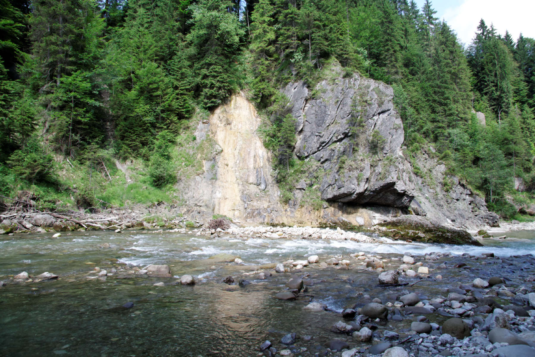 Saulgrub, Ammer am Eintritt in die Scheibum